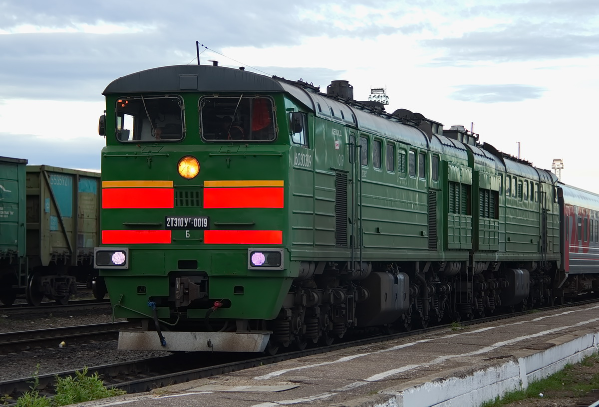 С 08.2004 г. в депо Печора. КР-1 ТЧ Сольвычегодск 04.1999 г. СР ТЧ Сольвычегодск 10.2002 г. КР Воронежский ТРЗ 03.2006 г. ТР-3 ТЧР Сольвычегодск 04.2013 г, срок службы продлен до 2035 г. (ПСС) СР Уссурийский ЛРЗ 2016 г.